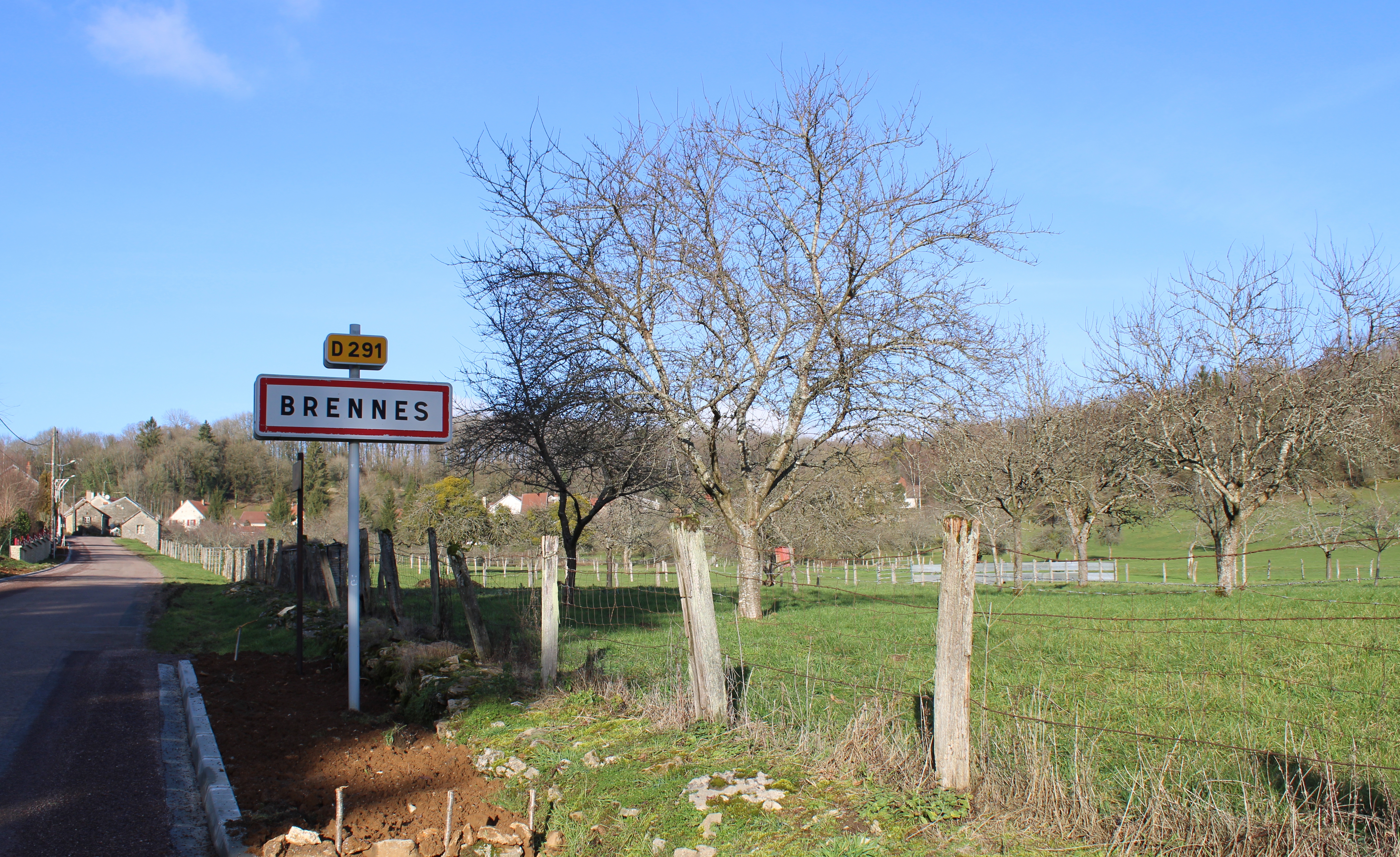 Entrée du village